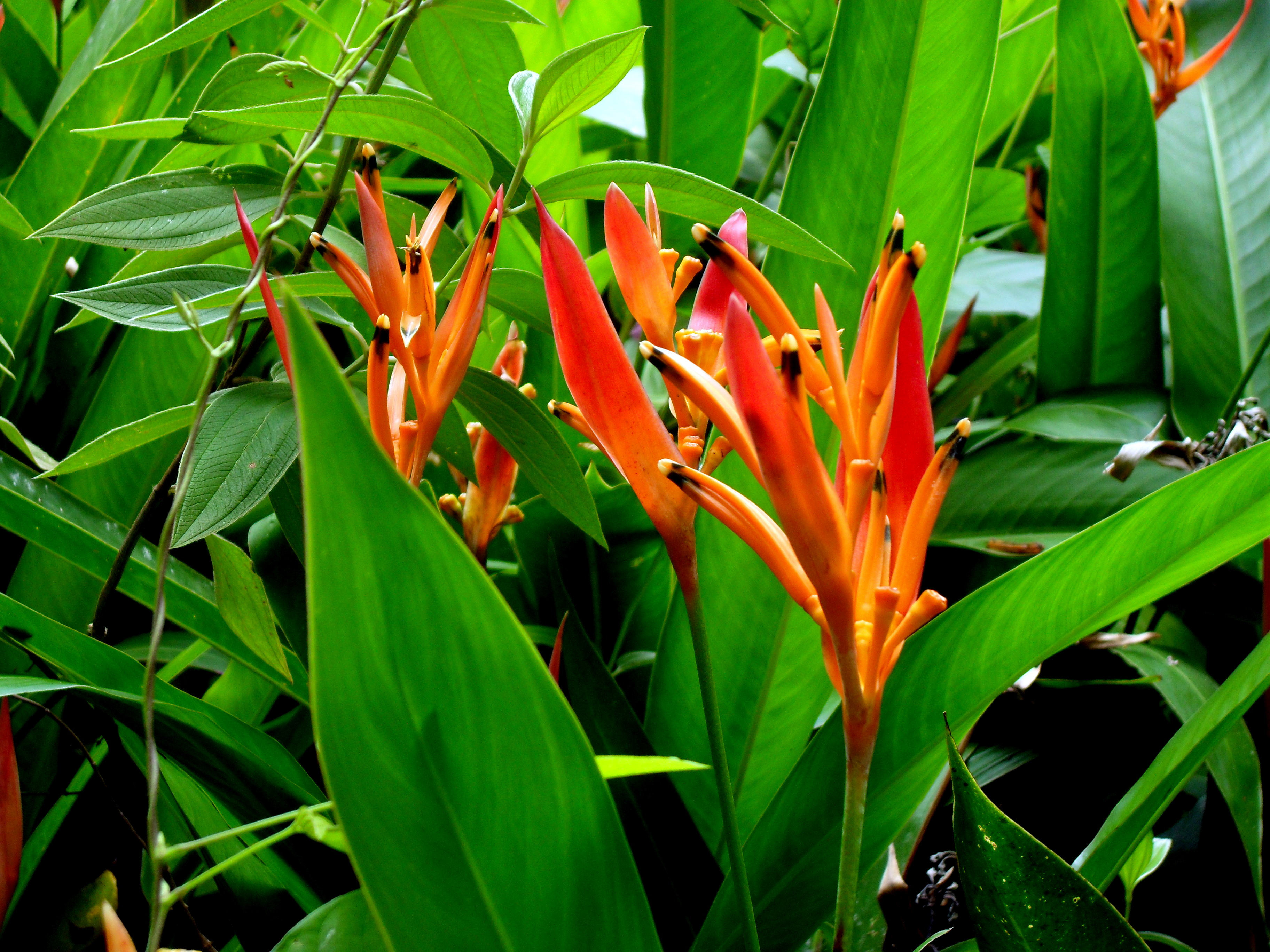 Río Arriba, Arecibo, Puerto Rico